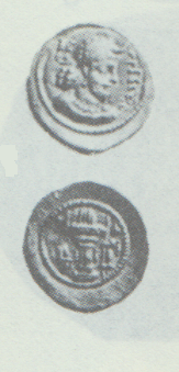 عکس‌برداری از دینار (طلا) یزدگرد یکم، نگه‌داری شده در موزه لندن